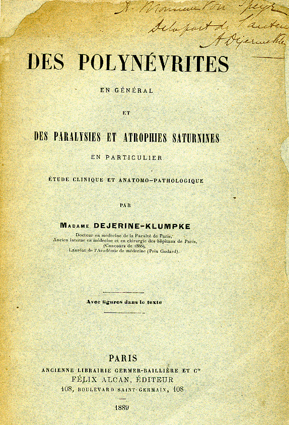 thèse de Madame Dejerine-Klumpke, dédicacée par l'auteur et autographe